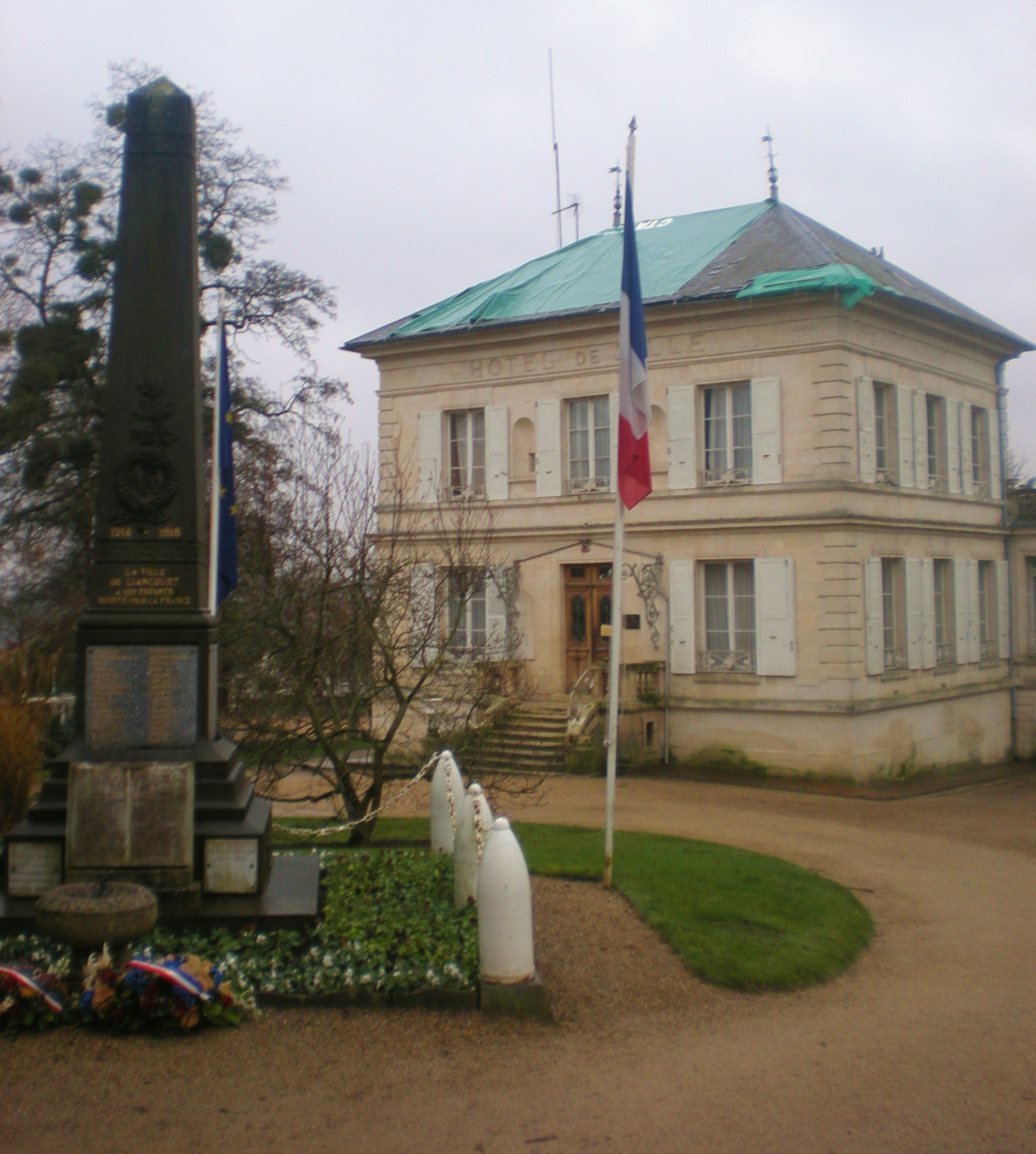 La mairie et le monument aux morts